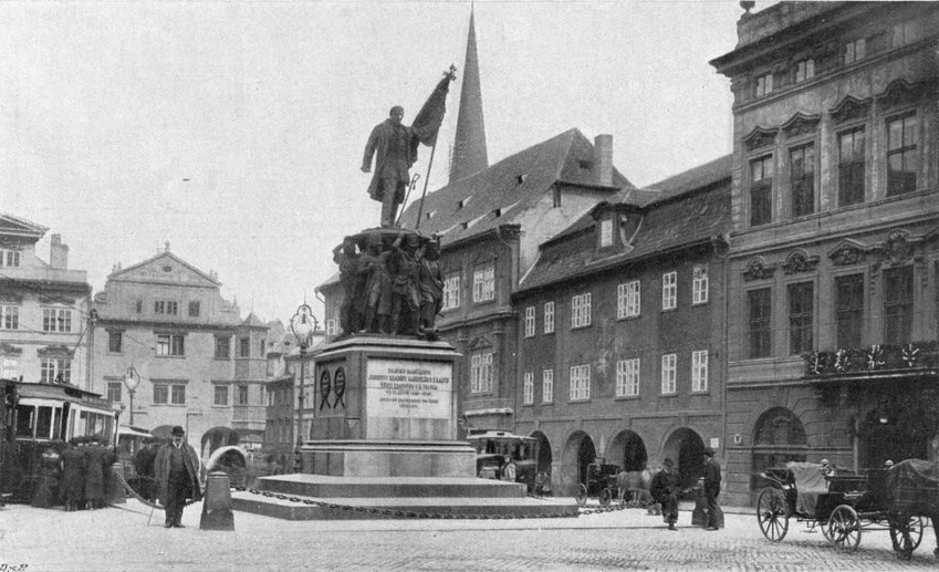 Pomník Maršála Radeckého na dnešním Malostranském náměstí